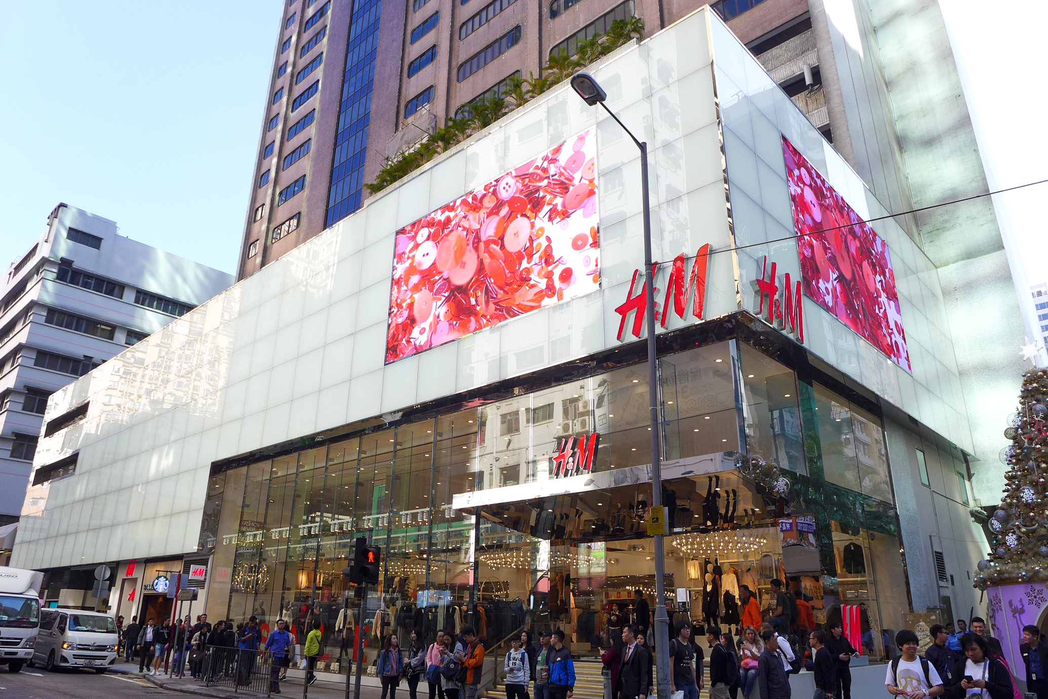 H&M Gala Place